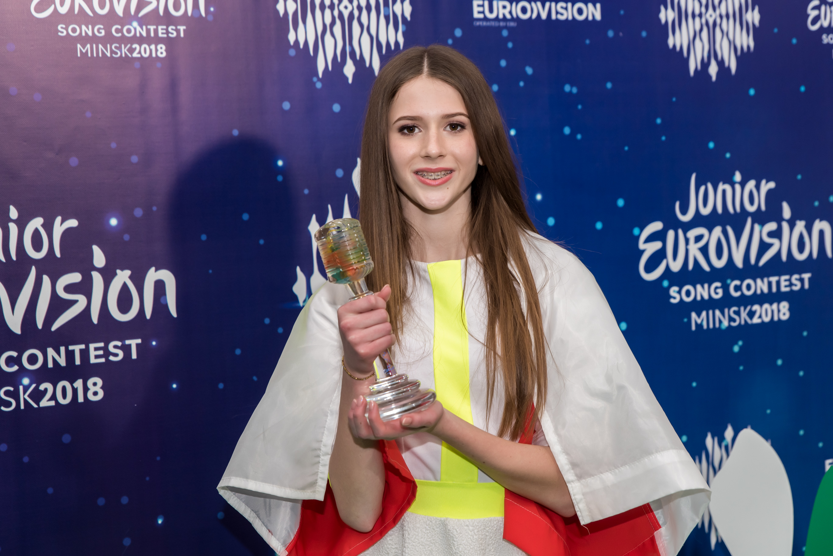 Роксана Вегель, победительница Детского Евровидения 2018, с призом